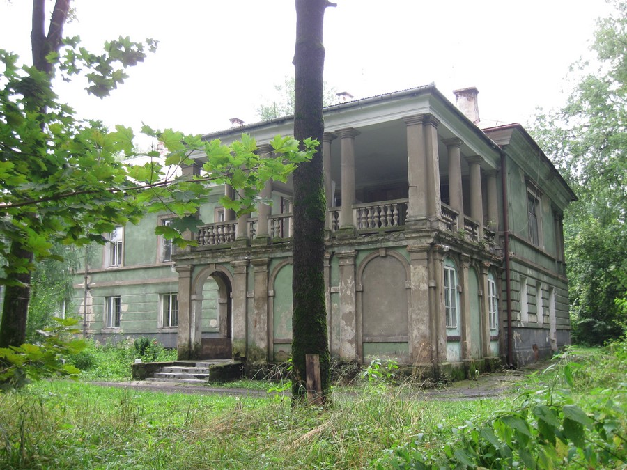 dwór